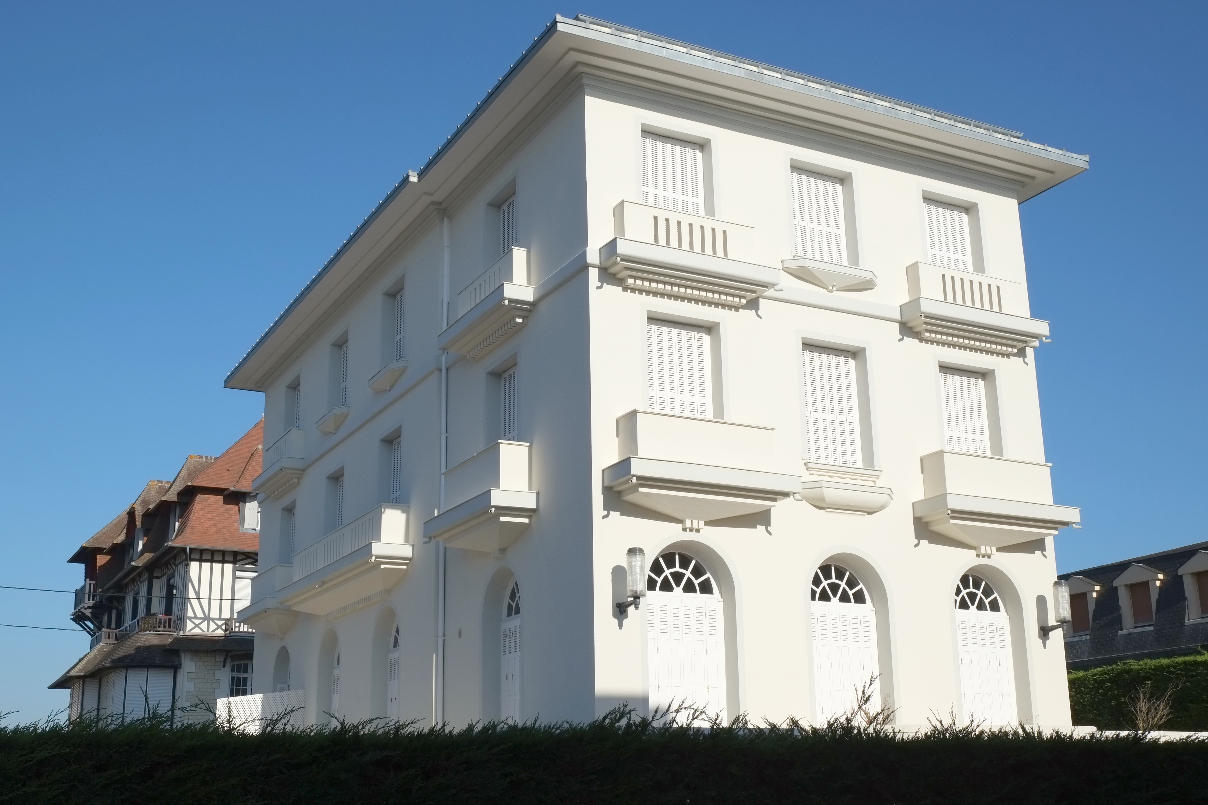 Villa Saint-Laurent in Cabourg im Département Calvados (Frankreich), Nr. 21 avenue du Maréchal-Foch